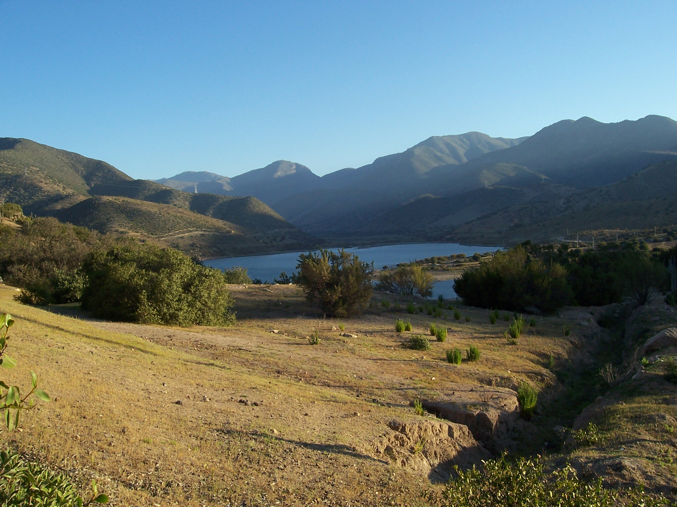 Estero Camisa, Salamanca, Chile